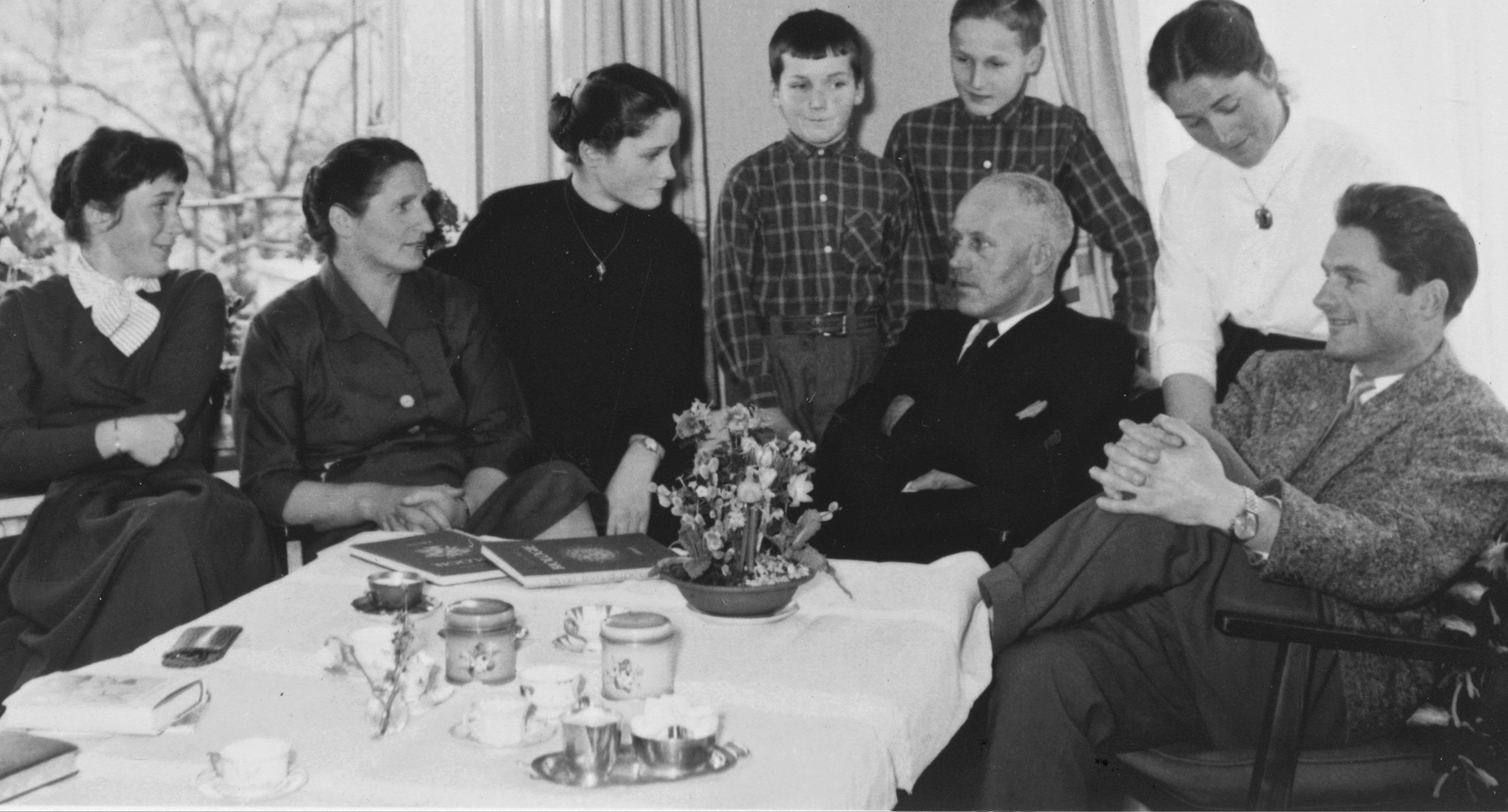 Pfarrer Gian Caprez (1905–1994) und Pfarrerin Greti Caprez-Roffler (1906–1994) mit ihren sechs Kindern in Kilchberg bei Zürich.